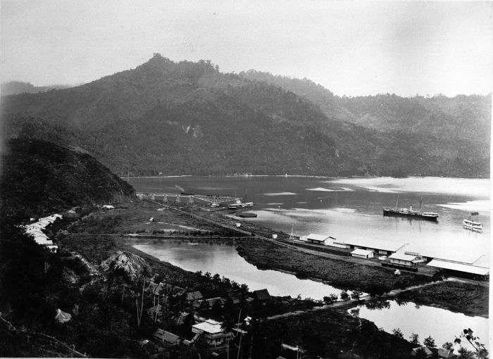 Foto. De Emmahaven te Padang, Sumatra`s Westkust